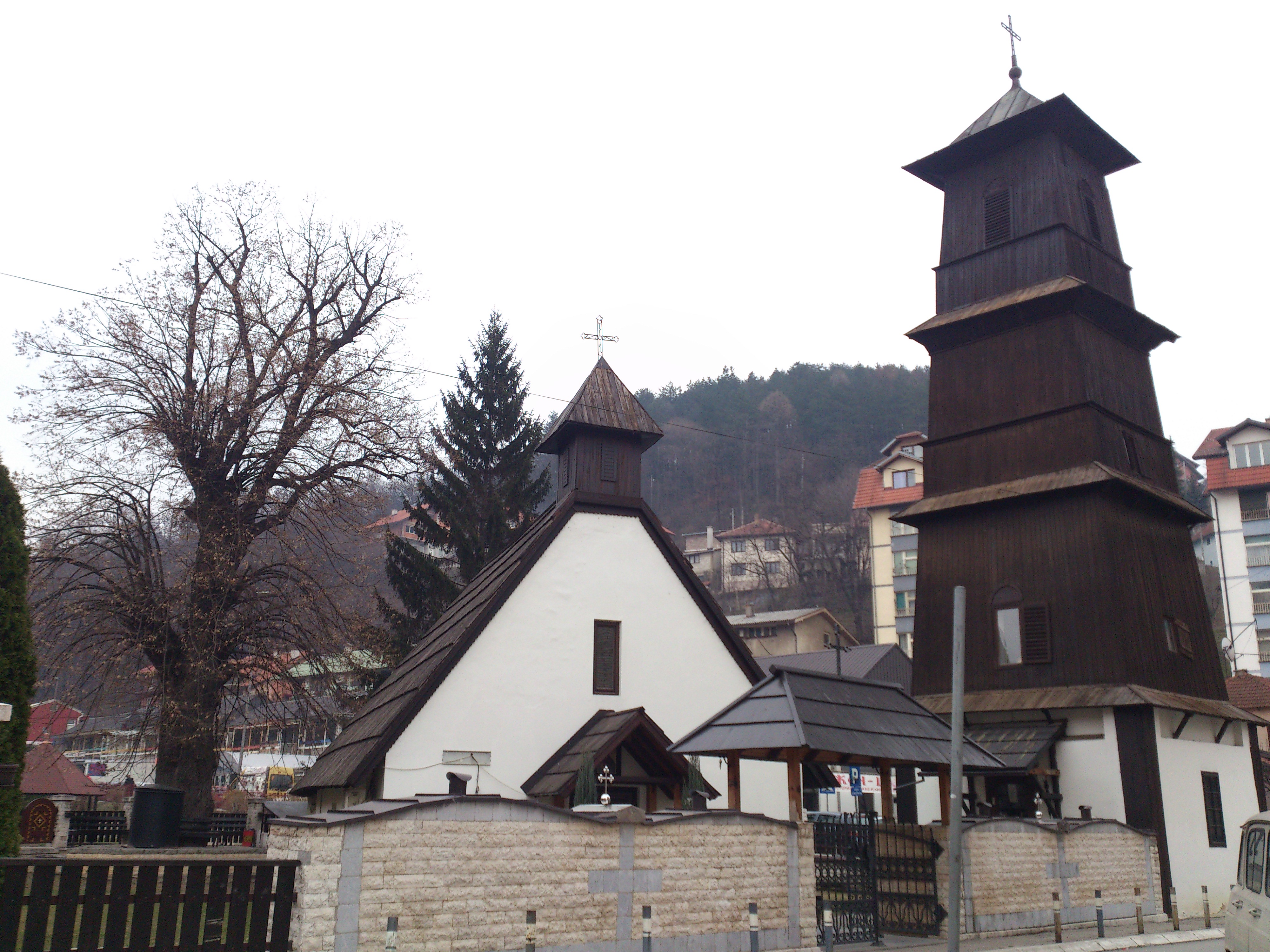 Kostel svatého Marka v Užicích (Srbsko). Celý název kostela zní Kostel svatého Apoštola a evangelisty Marka. Nachází se na ulici Nikoly Pašiće 41, a je památkově chráněn